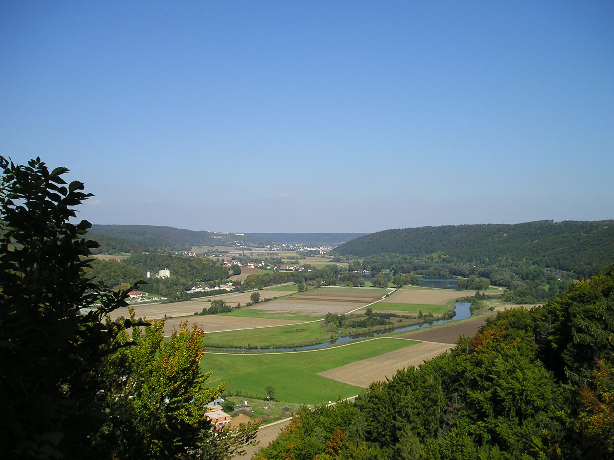 Blick von den Unteremmendorfer Burgställen auf das Altmühltal in Richtung Beilngries